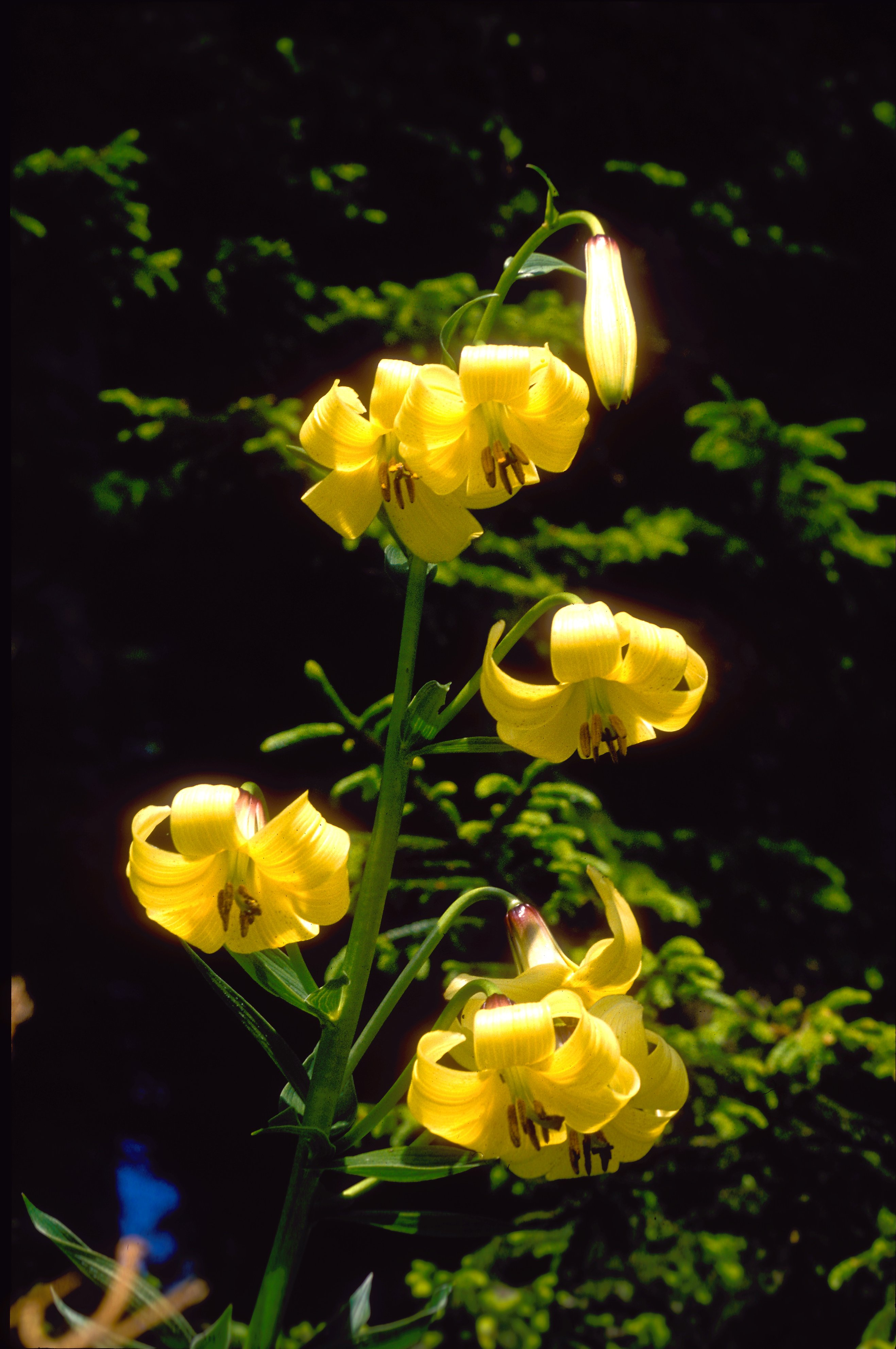 Lilium monadelphum var. armenum in habitat at Zigana Pass, Turkey